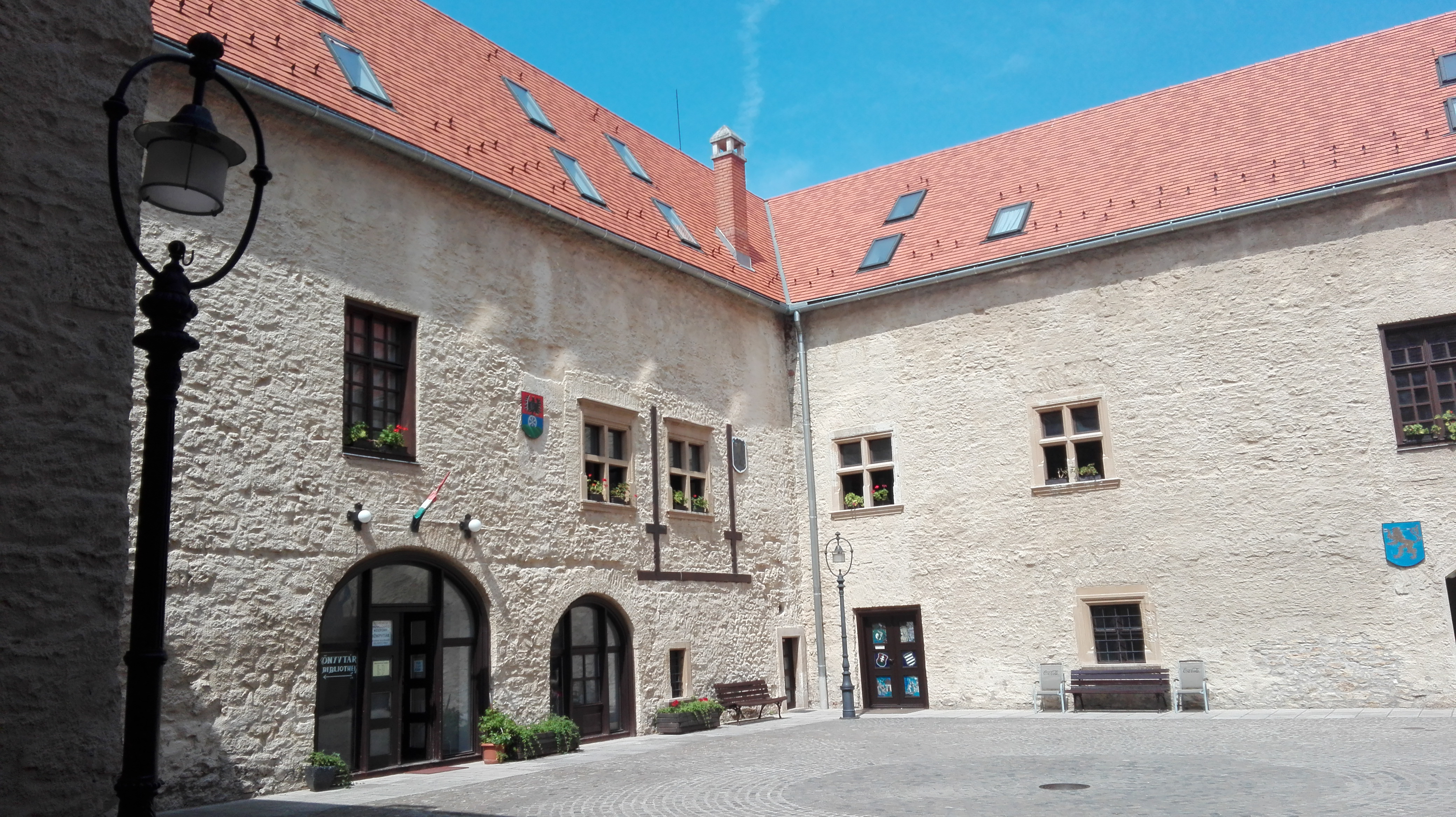 Castle of Szerencs, Hungary